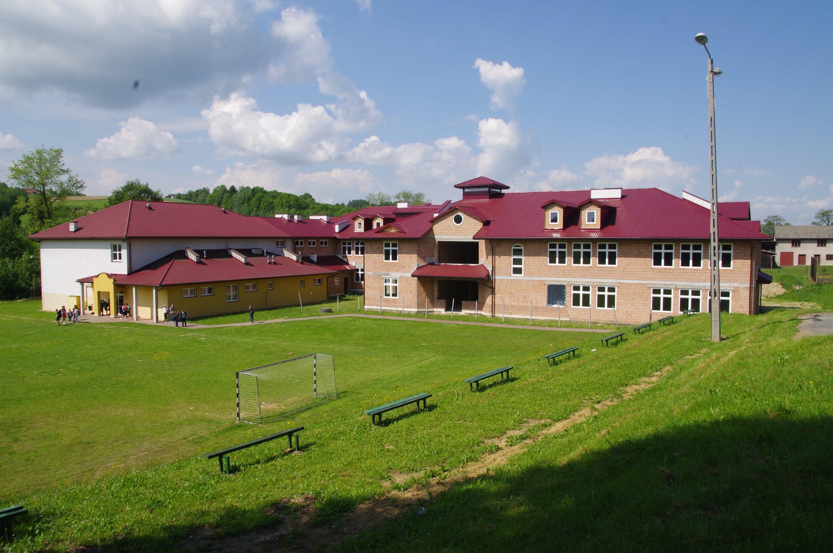 Szkola w Siemiechowie